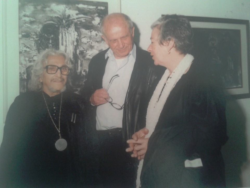 משה סחר, בטי סחר ומשה ברנשטיין